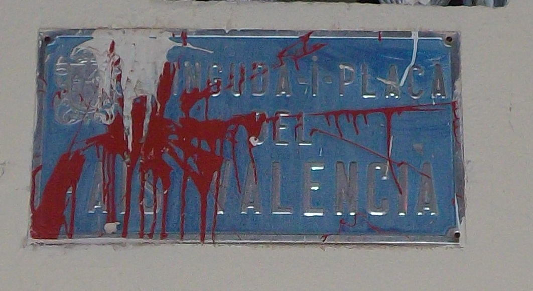 Placa de la Plaça del País Valencià, Xàtiva. Derivat de File:Plaça del País Valencià, Xàtiva, placa.JPG